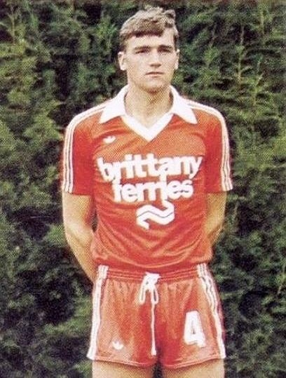 Yvon Le Roux en 1979 (Stade brestois), 'Football 80', Panini figurina n°29.